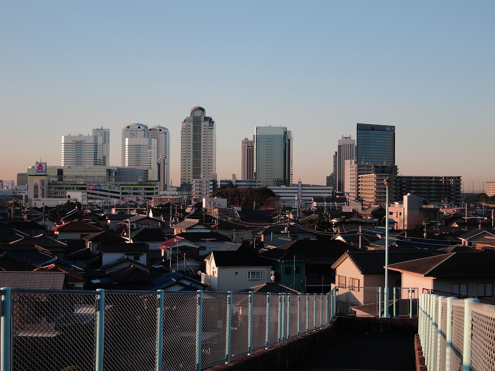 幕張と海浜幕張